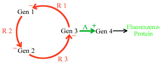 Repressilator, eun genetischer Schaltkreis